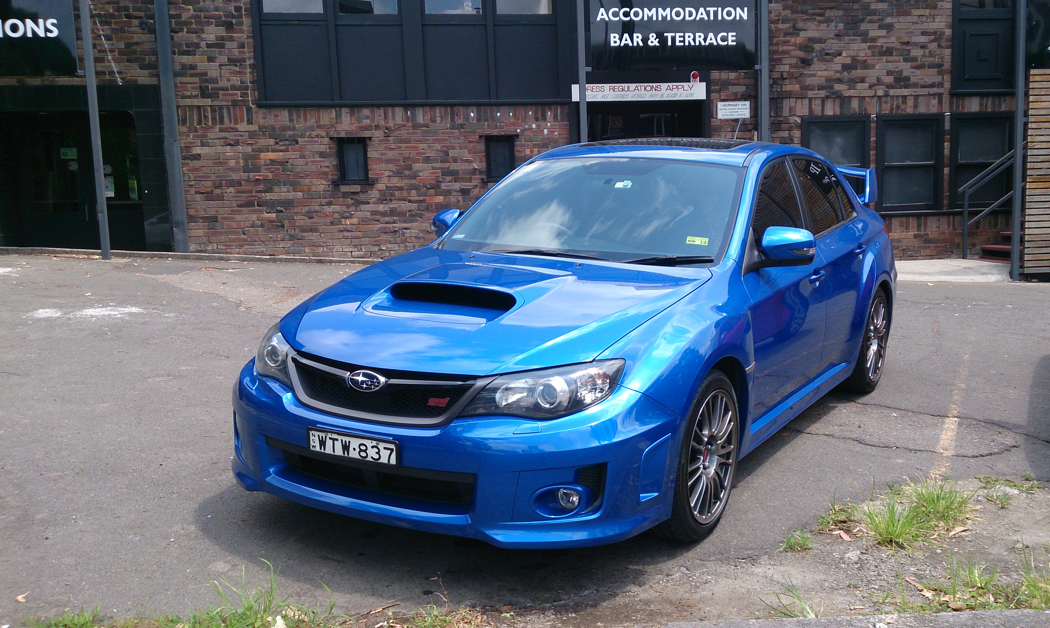 Subaru Impreza WRX STi